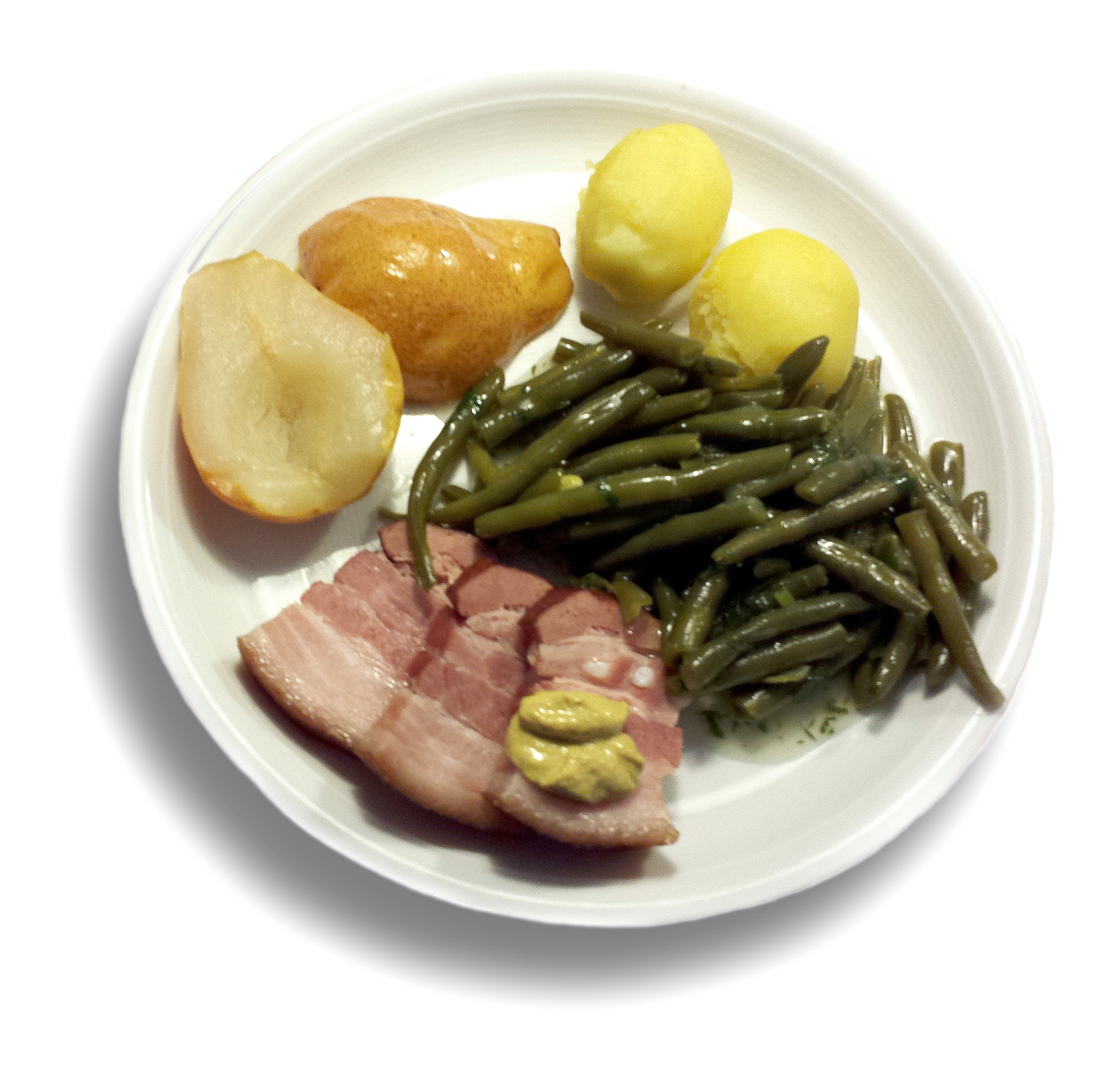 Birnen, Bohnen und Speck, ein Gericht der norddeutschen Küche